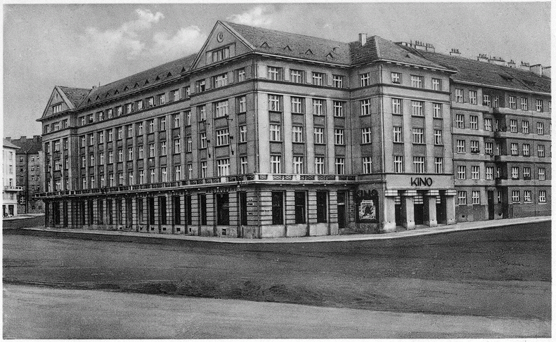 Neoklasicistní budova z roku 1929 - Palác Bajkal (Vítězné náměstí 4/684, 160 00 Praha 6 – Dejvice). V přízemí byl zřízen biograf "Bajkal". Ten byl následně a postupně přejmenováván na "Kyjev" a "Evropa". V přízemí byla kromě biografu zbudována i prostorná restaurace a různé obchody. V dalších poschodích paláce se nacházely kancelářské prostory, společenské místnosti a byty. V letech po druhé světové válce sloužil palác zejména potřebám resortu ministerstva obrany pod názvem ÚDA - Ústřední dům armády. Po sametové revoluci od roku 1998 byl palác přejmenován na DAP - Dům armády Praha. Od září roku 2008 (po generální rekonstrukci paláce) slouží Dům armády Praha nejen potřebám Armády ČR ale jsou zde poskytovány hotelové služby (HOTEL DAP***) i širší veřejnosti.